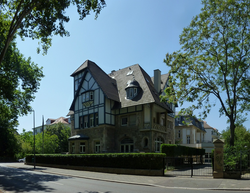 Corpshaus des Corps Rheno-Nicaria zu Mannheim und Heidelberg